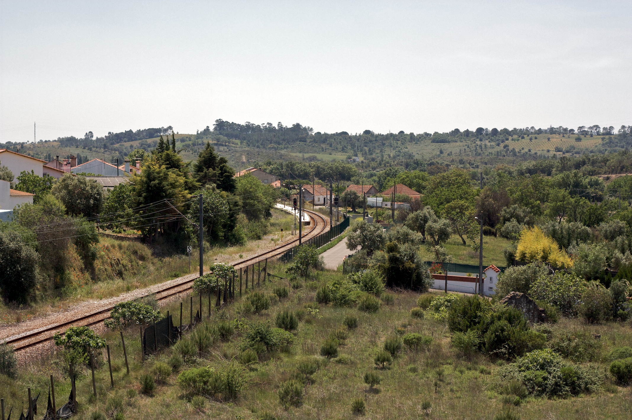 ao fundo, o apeadeiro de Soudos • Vila Nova. Via férrea: Ramal de Tomar [PK 1] Local: Vila Nova Data e hora: 6 de Maio de 2009 [14h23] Sentido: Lamarosa